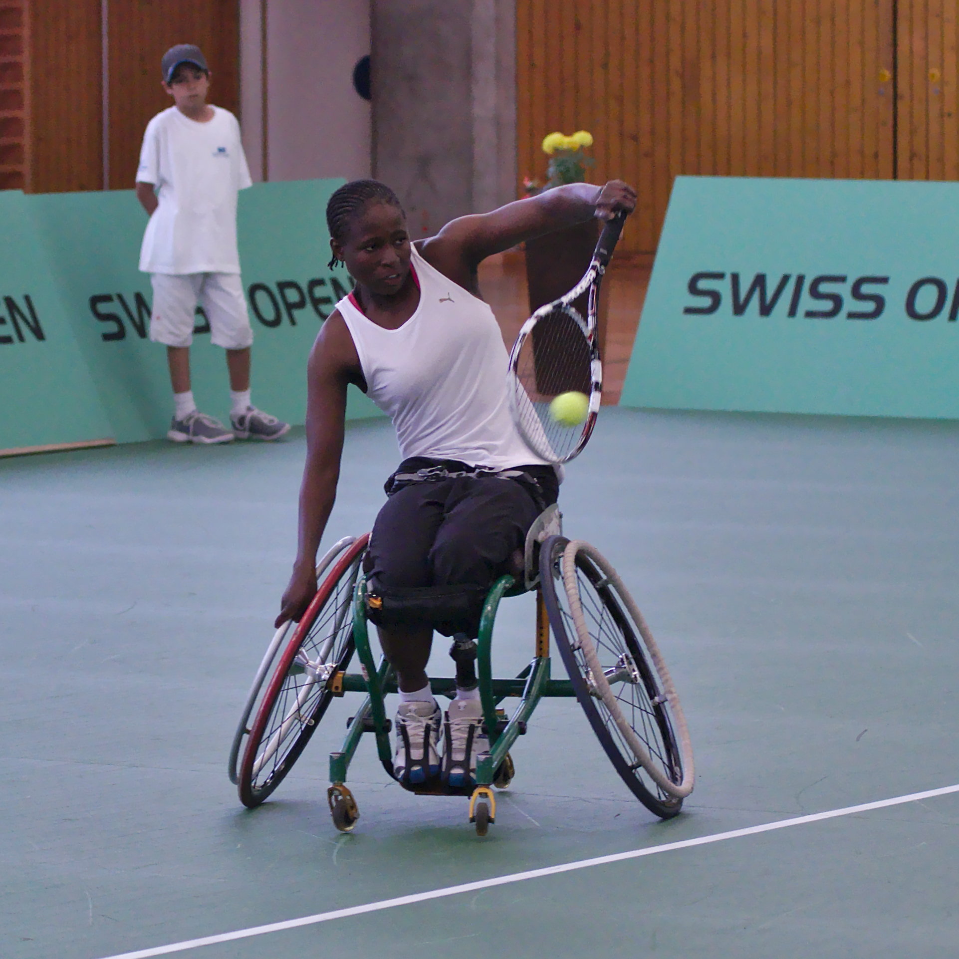 Swiss Open Geneva - 20140712 - Semi final Women - Y. Kamiji vs K. Montjane